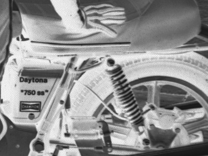 Unregelmäßiges Runzelkorn auf einem SW-Negativ, entstanden durch einen Verarbeitungsfehler (Foto 1976, Scan 15.1.2006)